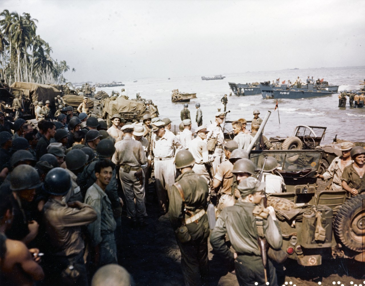 General Douglas MacArthur (center), accompanied by Lieutenant Generals George C. Kenney and Richard K. Sutherland and Major General Verne D. Mudge (Commanding General, First Cavalry Division), inspecting the beachhead on Leyte Island, 20 October 1944. Note the crowd of onlookers. The swamped LCVP in the right background is from USS Ormsby (APA-49). Photograph from the Army Signal Corps Collection in the U.S. National Archives.